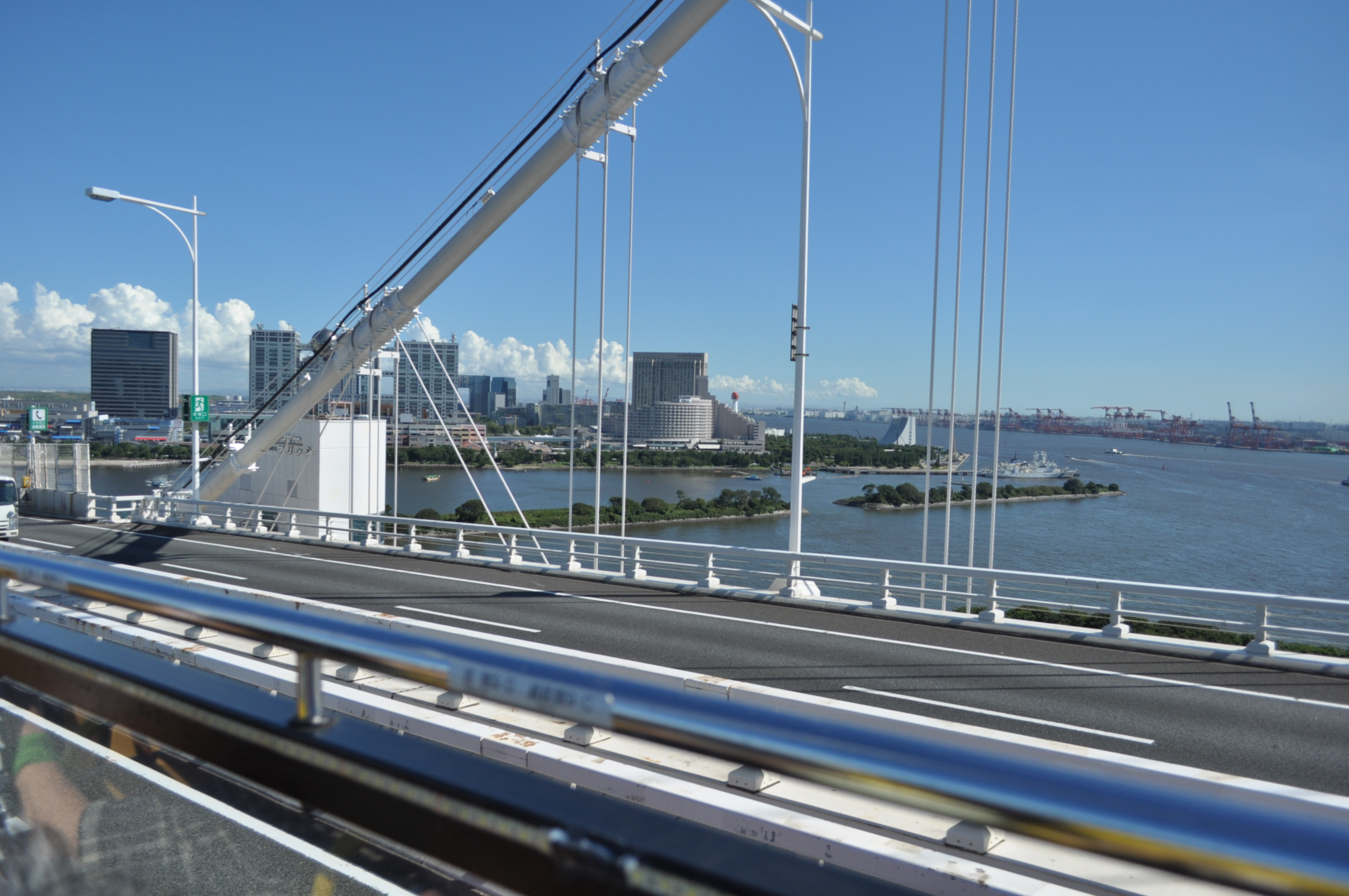 スカイバス東京